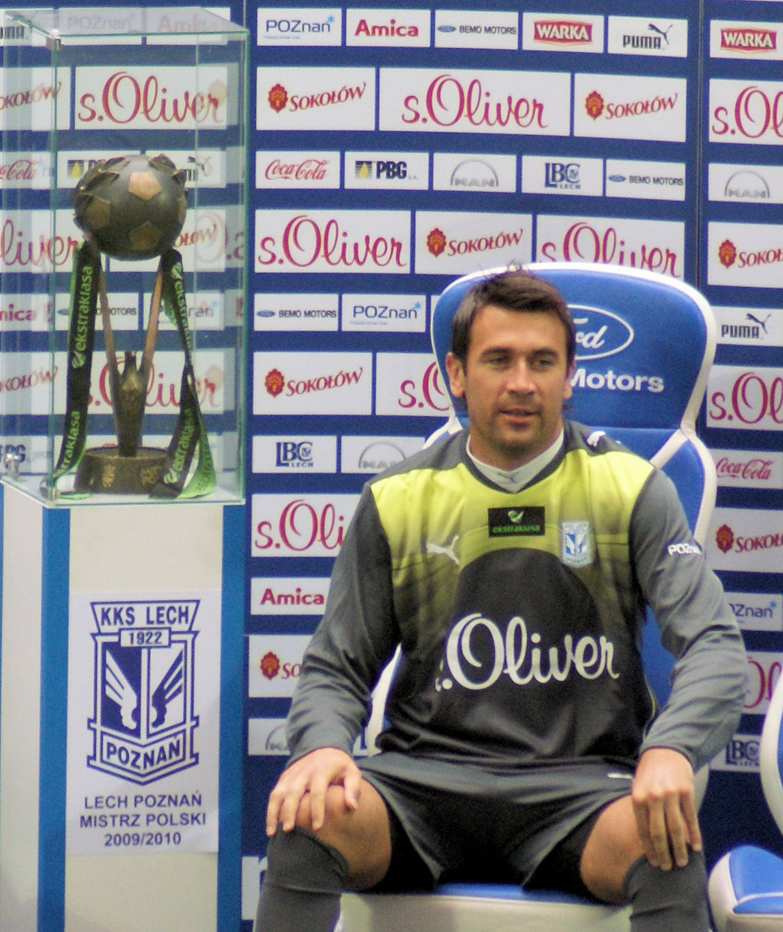 Krzysztof Kotorowski, bramkarz Lecha Poznań z Pucharem Mistrza Polski, prezentacja piłkarzy na Stadionie Miejskim przed sezonem 2010/2011.